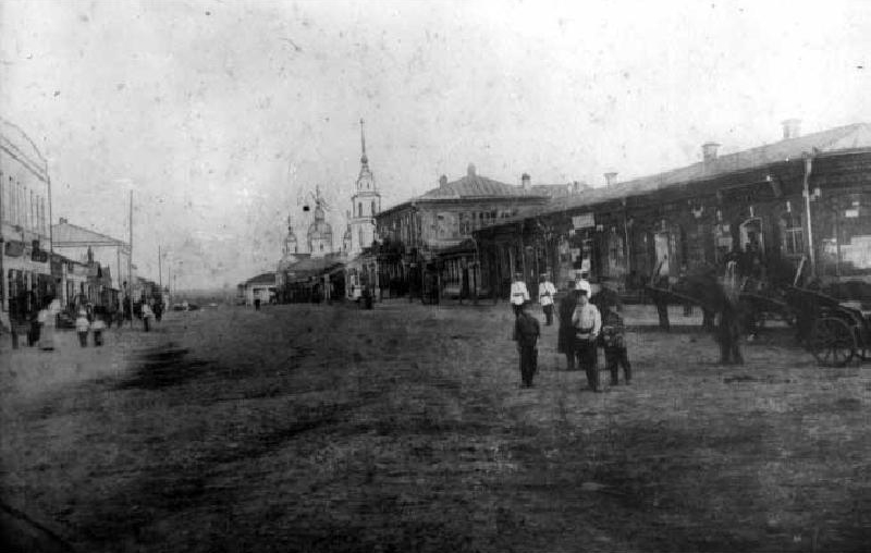 Чаплыгин